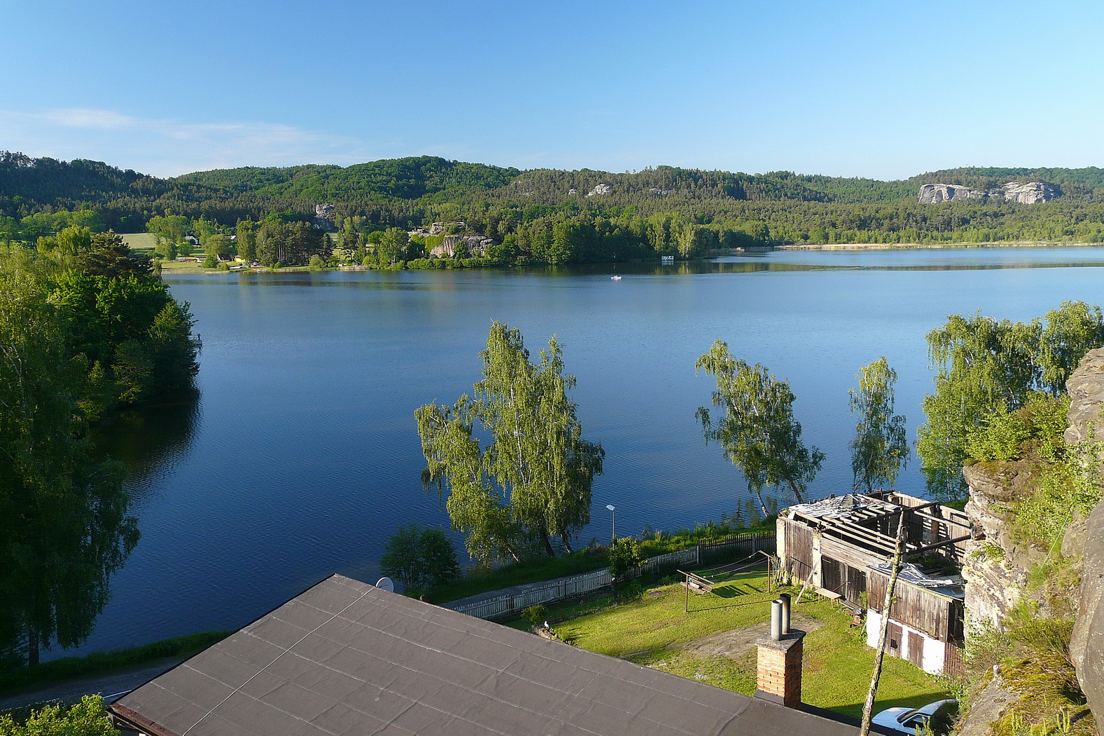 Komárovský rybník z jižní skály